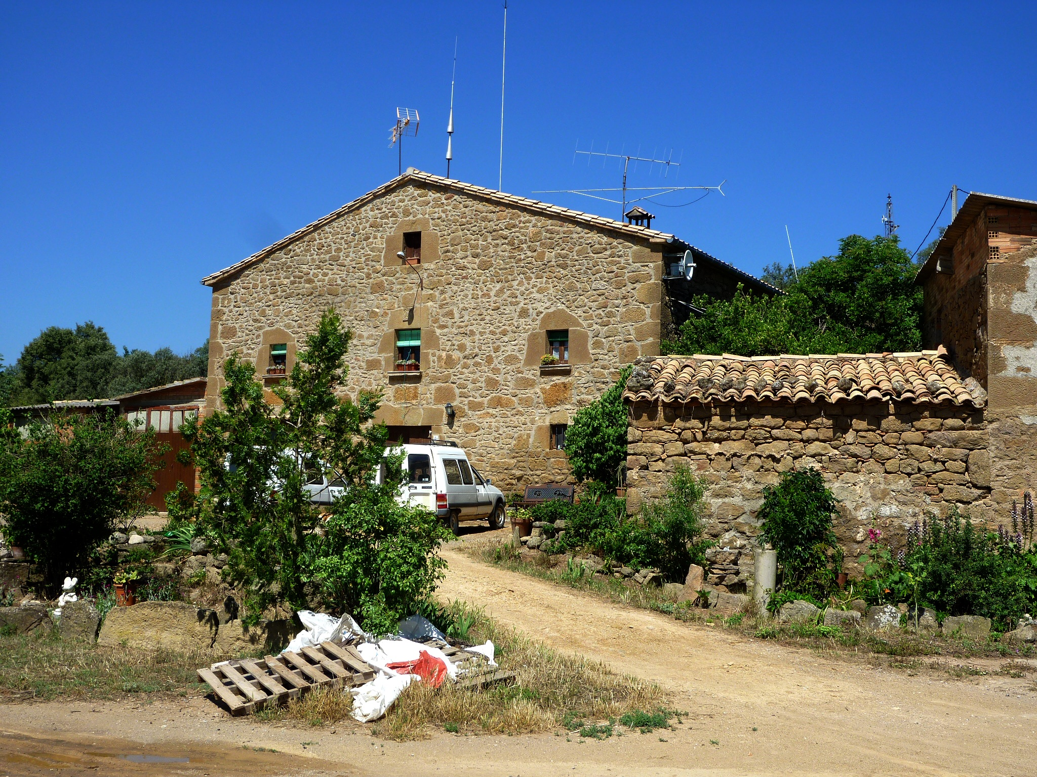 Masia de Sant Romà (Pinell de Solsonès): façana